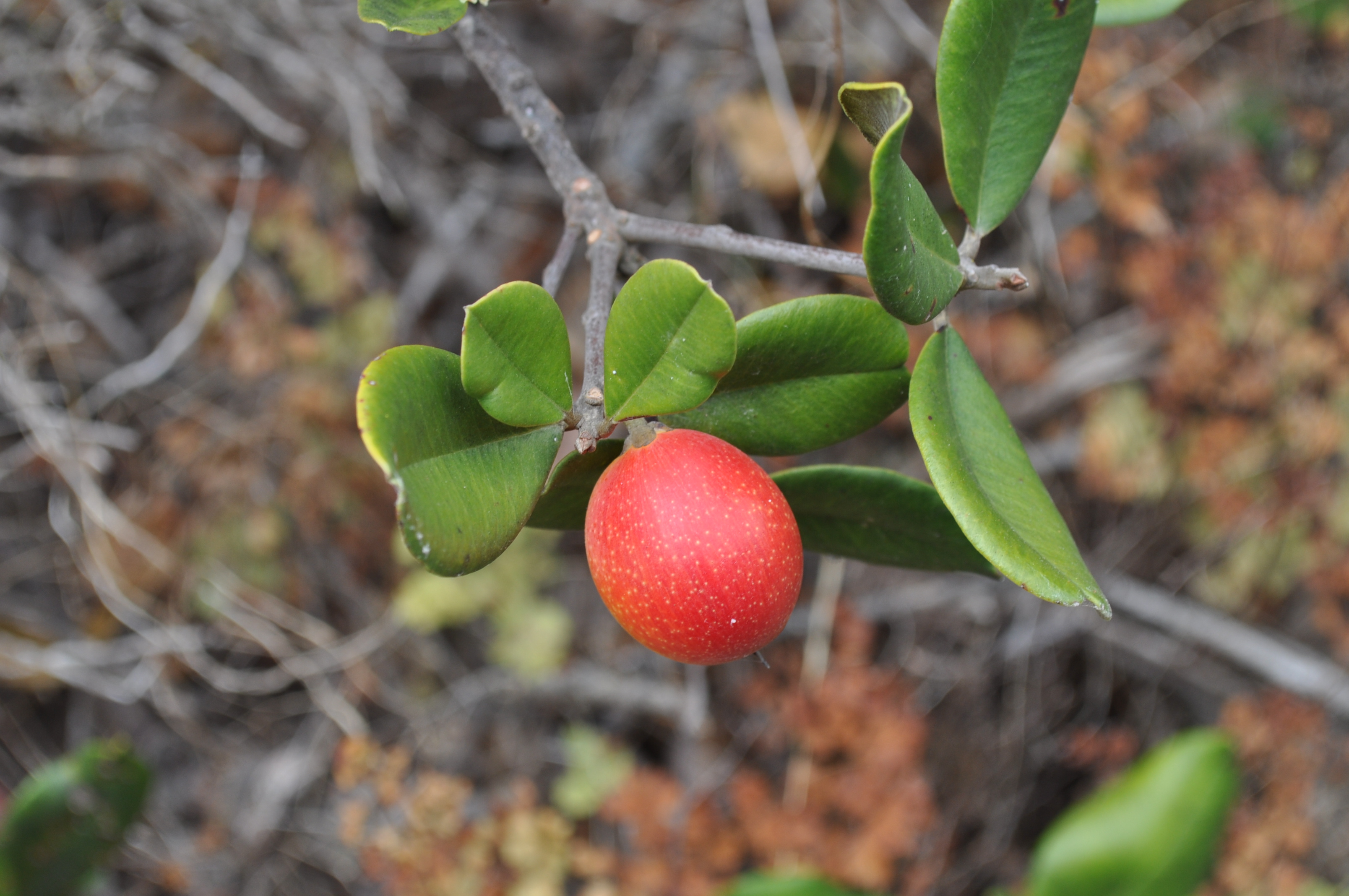 Pouteria splendens (Lúcumo chileno). Especie endémica, escasa y en peligro. En la foto, tomada en Los Molles (V Región de Valparaíso, Chile) en el mes de enero se aprecia un fruto maduro.